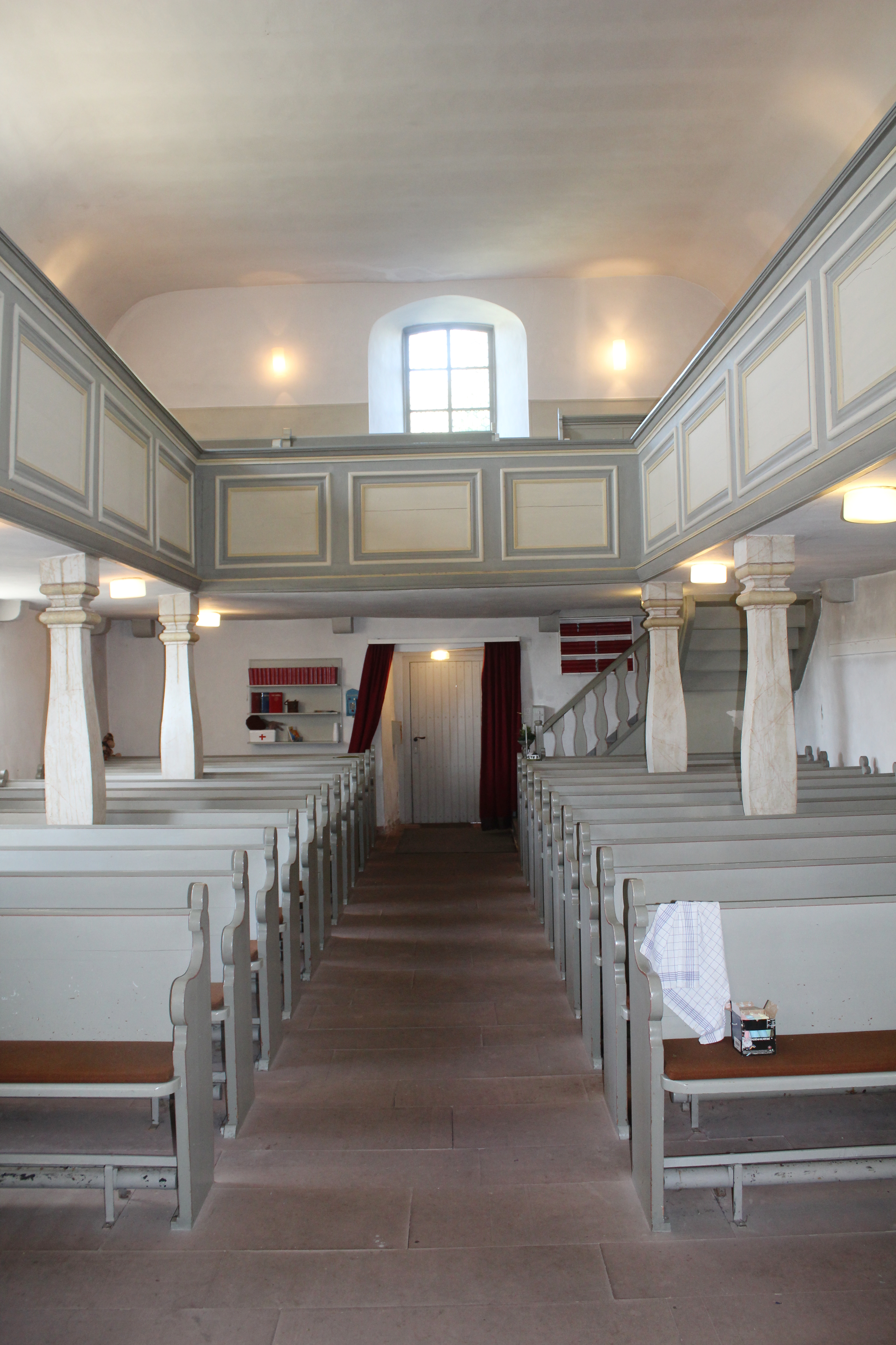 Ev. Kirche Oberbiel, Solms, Lahn-Dill-Kreis, Hessen, Deutschland